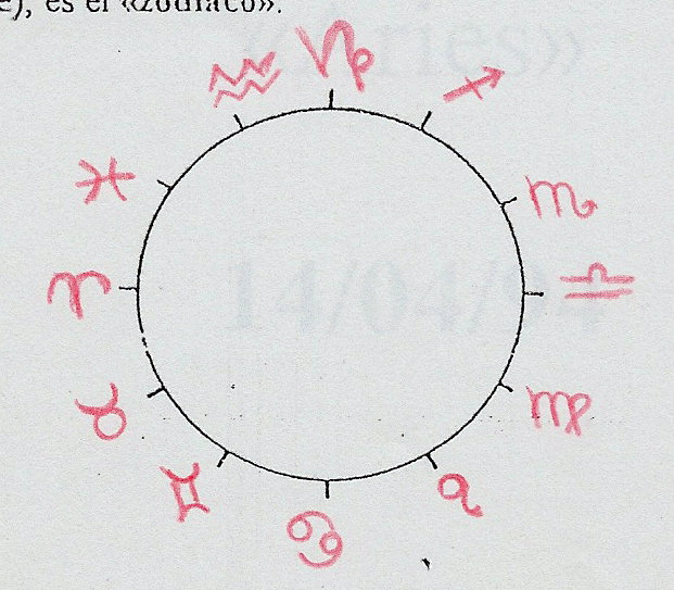 Es una imagen delZodíaco usada para fines didácticos. Los símbolos están hechos con lápiz rojo